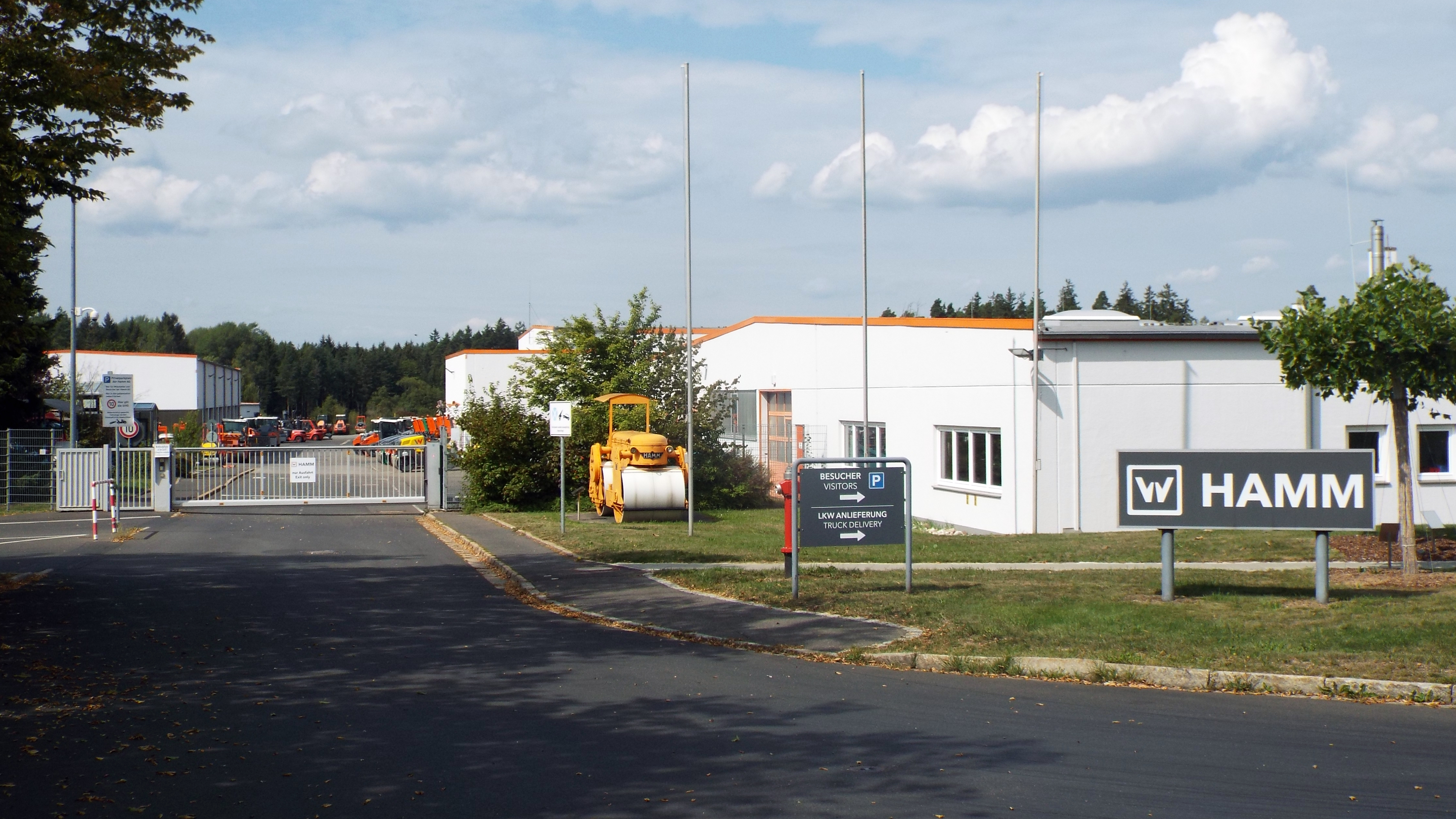 Werksgelände der Firma Hamm AG in Tirschenreuth